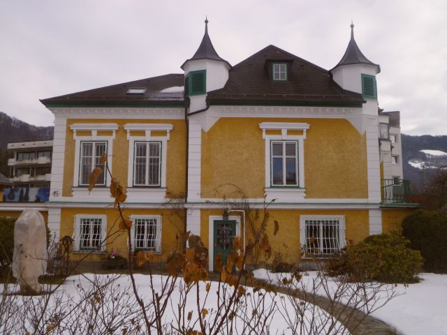 Vogelsang- oder Luegermayrschlößl in Parsch